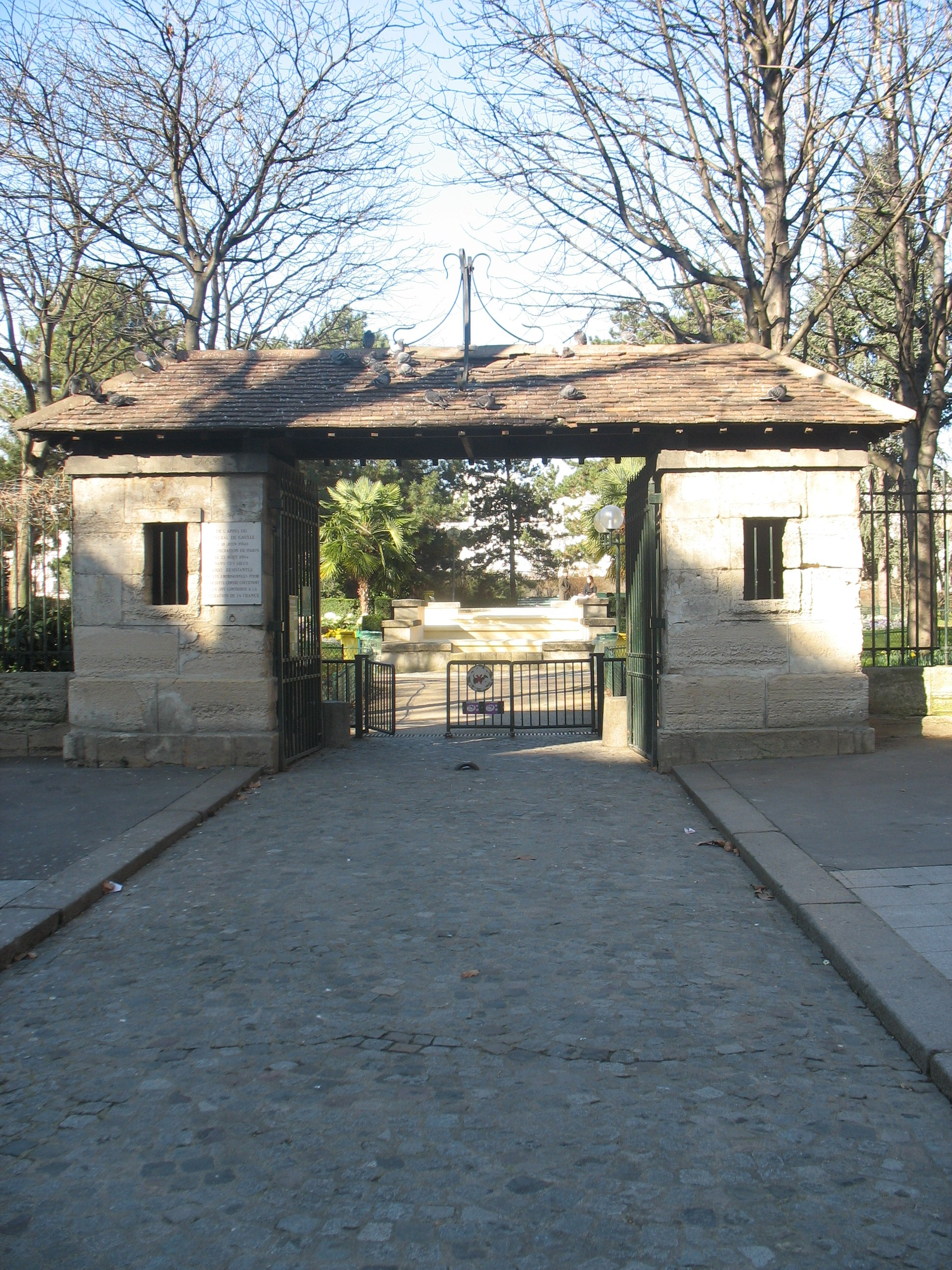 Les deux guérites d’accès de l'ancienne prison de la petite Roquette servent d'entrée à l'actuel square de la Roquette au 168 rue de la Roquette.